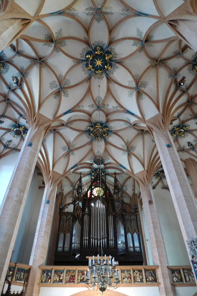 Orgel der St.-Annen-Kirche